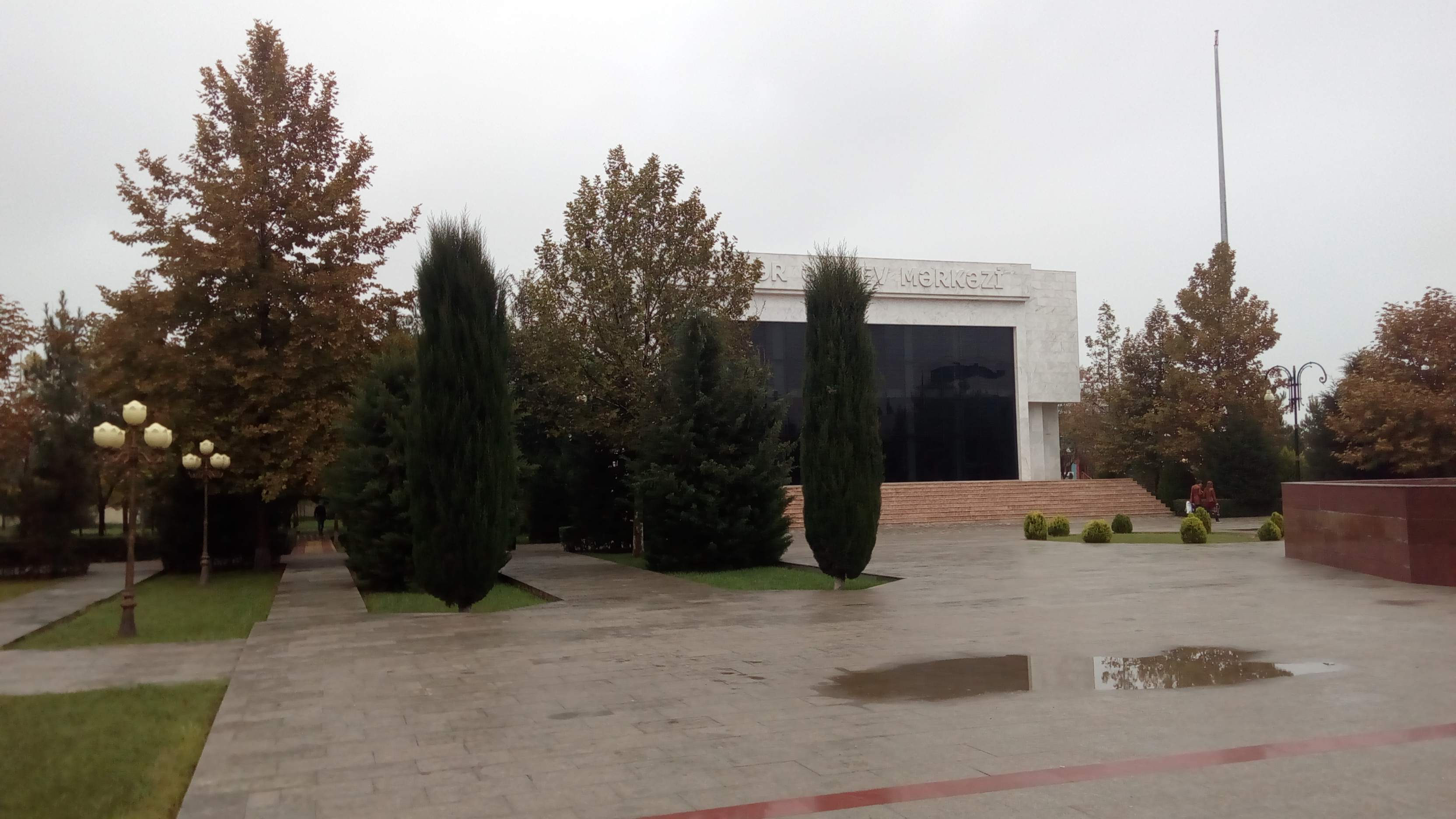 Beyləqan